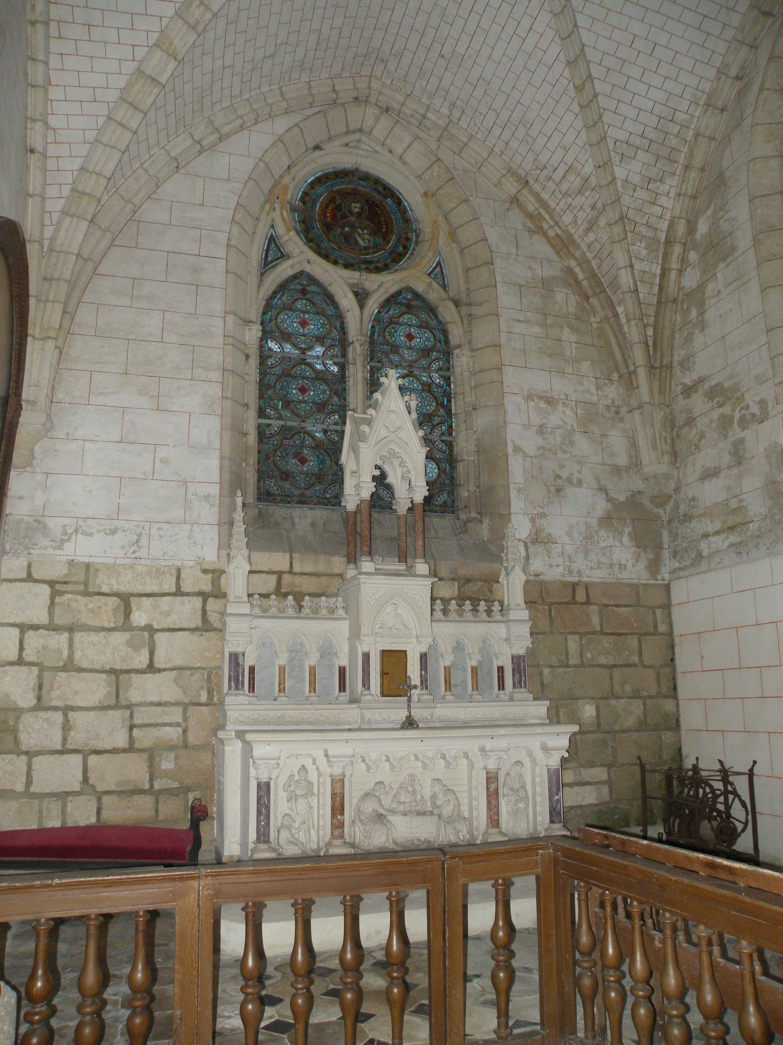 Intérieur de l'église Saint-Martin de Frouville